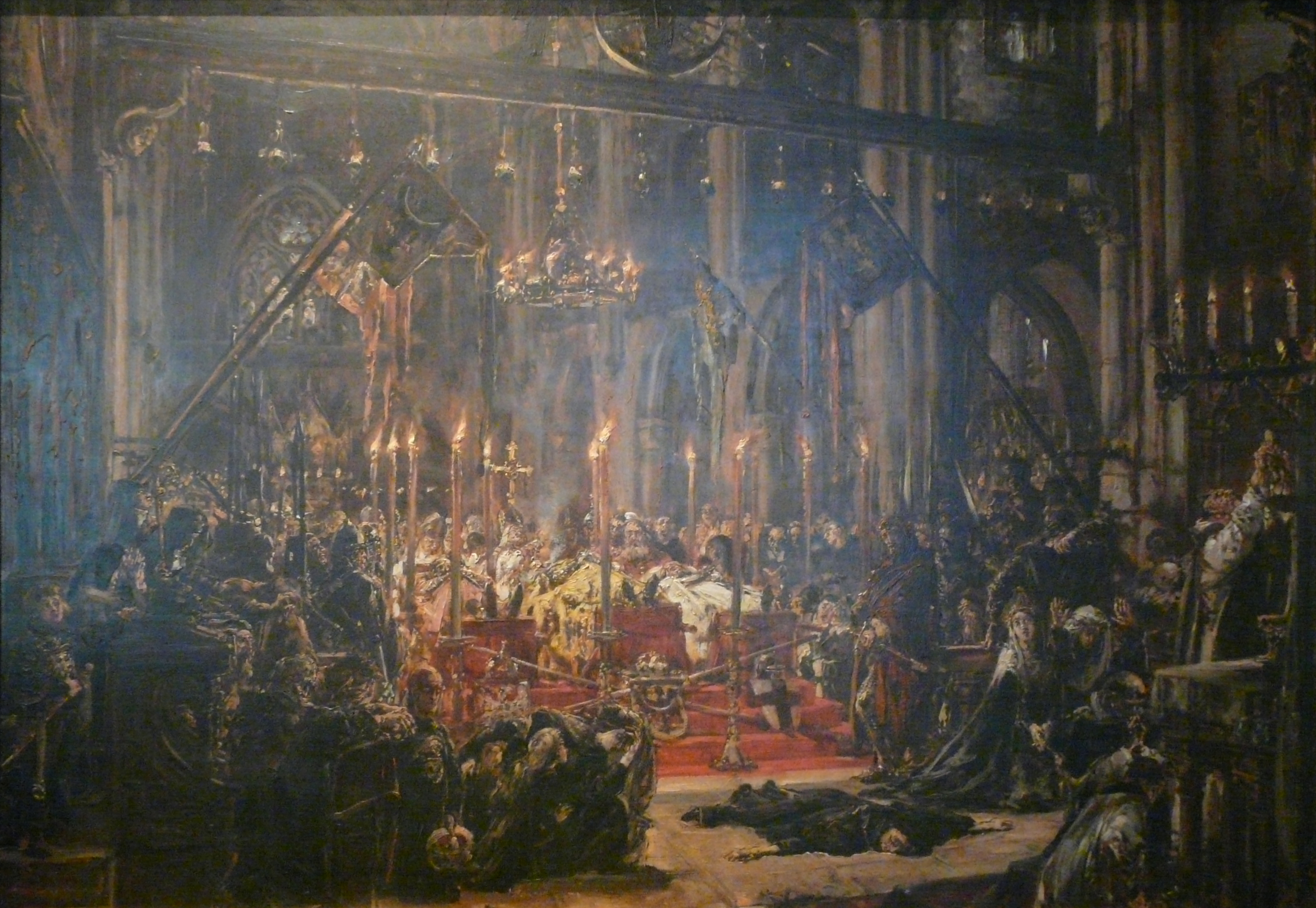 Royal Castle, Warsaw. Painting by Jan Matejko, Kleska legnicka. Odrodzenie RP, 1241.